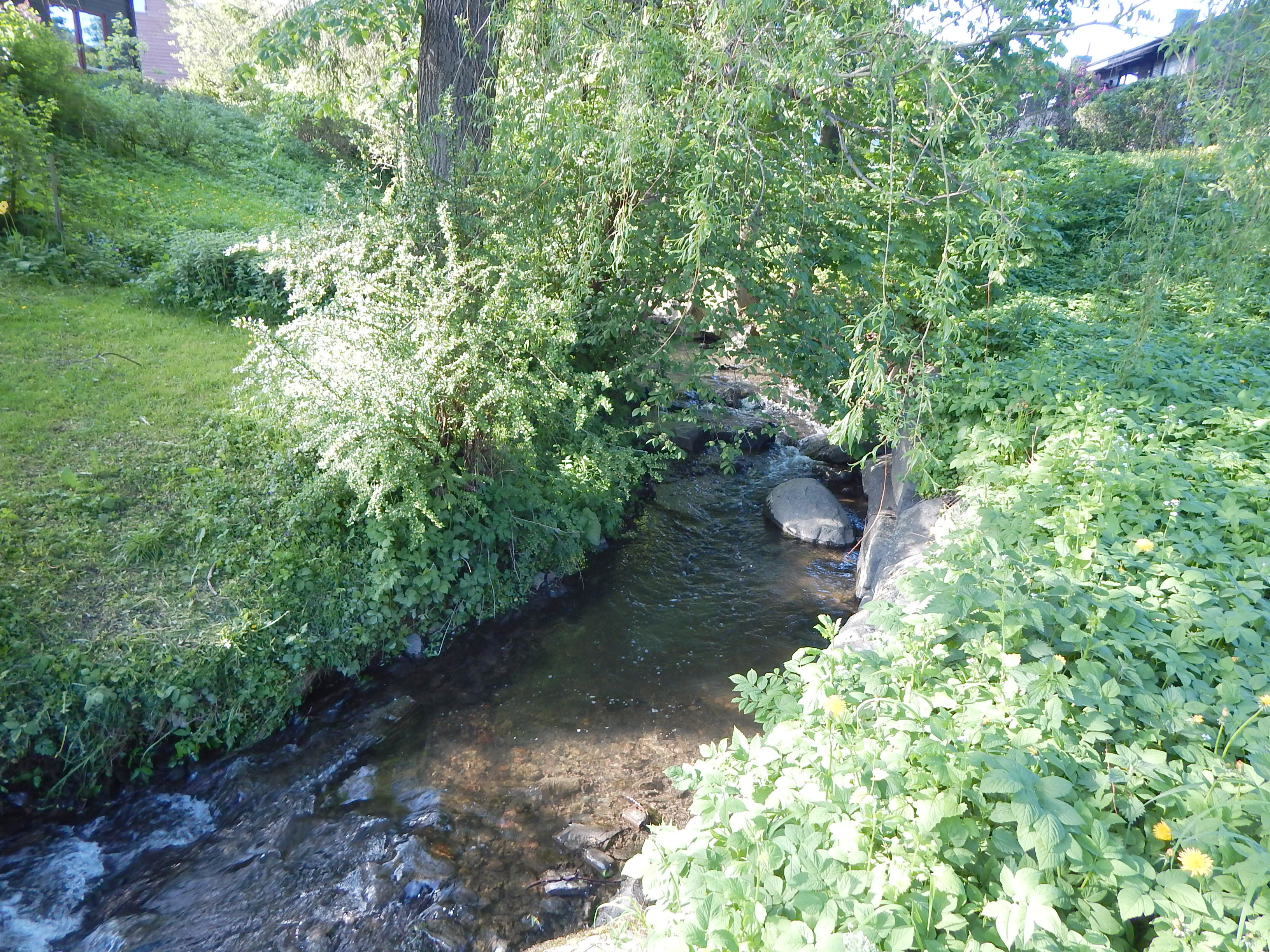 Mærradalsbekken like nord for Sigurd Iversens vei